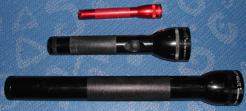 Verschiedene Mag-Lite Lampen